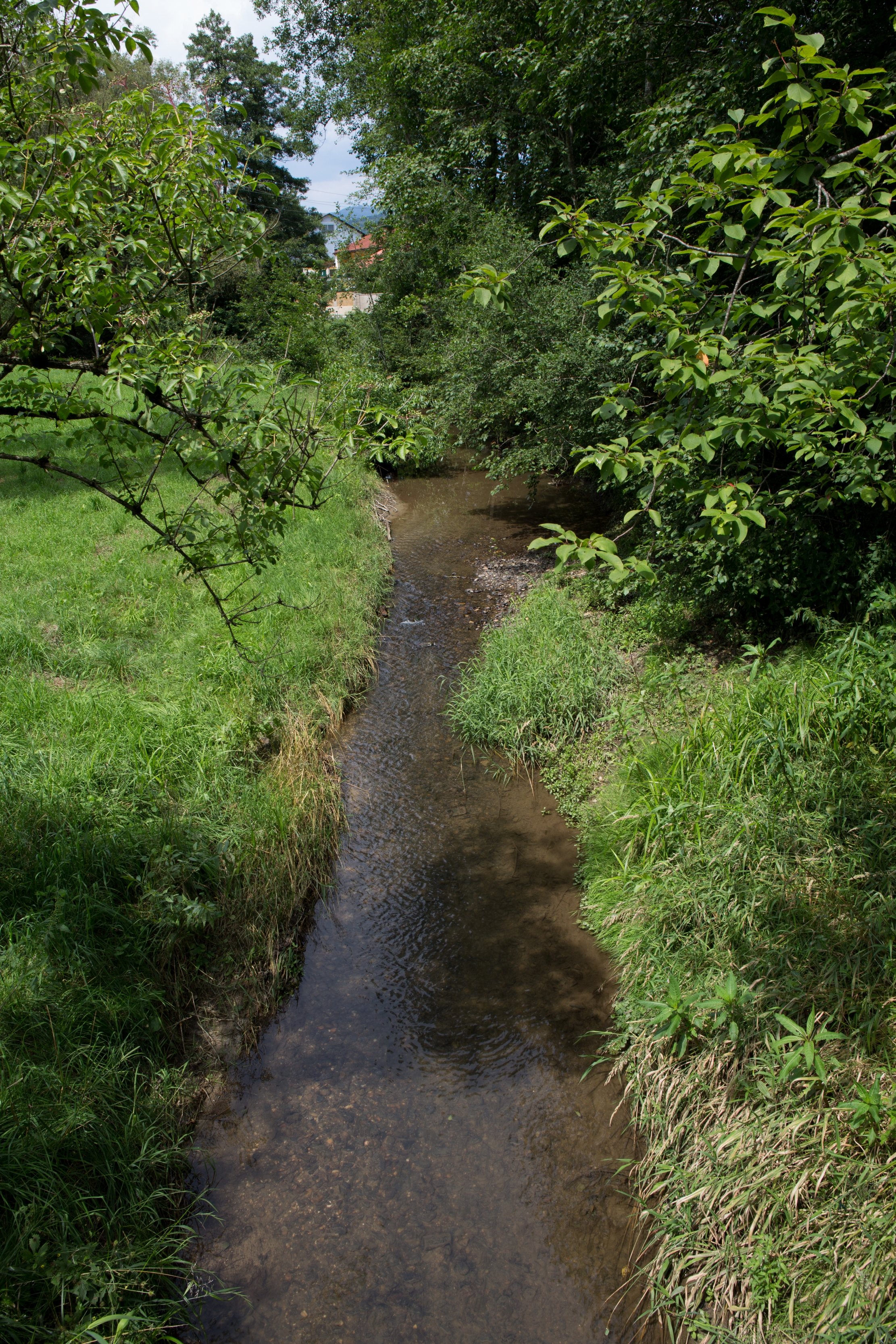 Rabnitzbach bei Kumberg, Steiermark, Österreich 'Rabnitzbach' (Q873125)